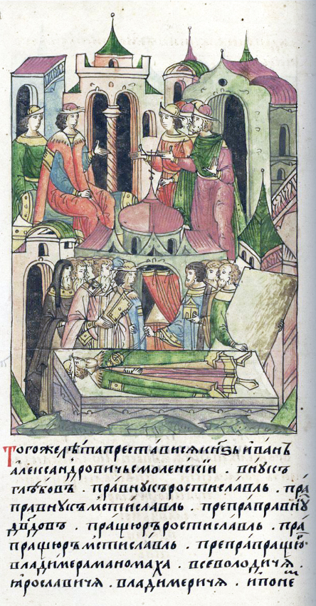 ЛИЦЕВОЙ ЛЕТОПИСНЫЙ СВОД В том же году преставился князь Иван Александрович Смоленский, внук Глебов, правнук Ростиславов, праправнук Мстиславов, препраправнук Давидов, потомок пращура Ростислава, прапращура Мстислава, препрапращура Владимира Манамаха Всеволодовича Ярославича Владимировича. И после него сел на княжение в Смоленске сын его Святослав.